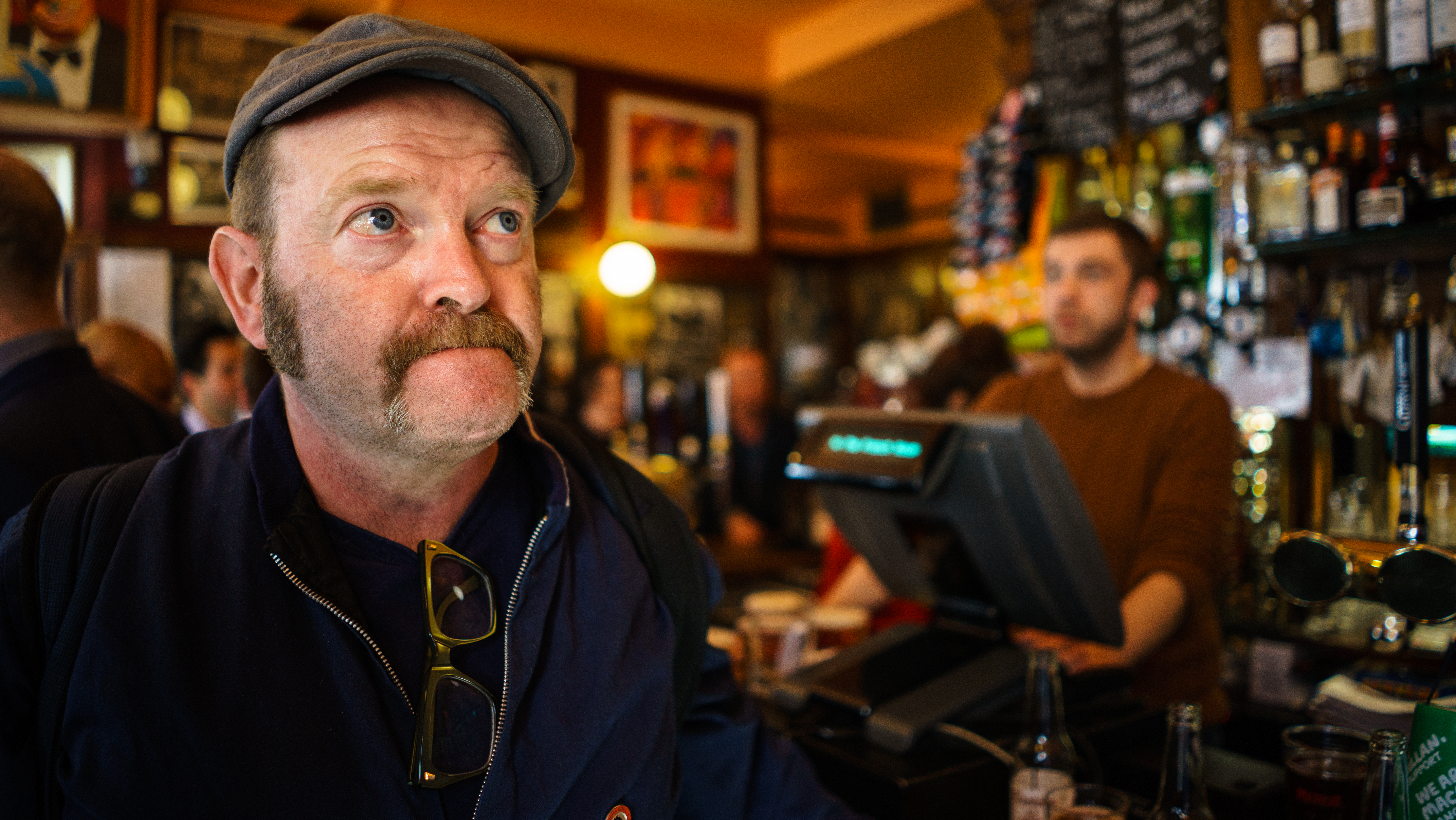 Photographie du peintre Ray Richardson dans un pub du centre de Londres.